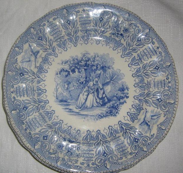 Flintgodstallrik